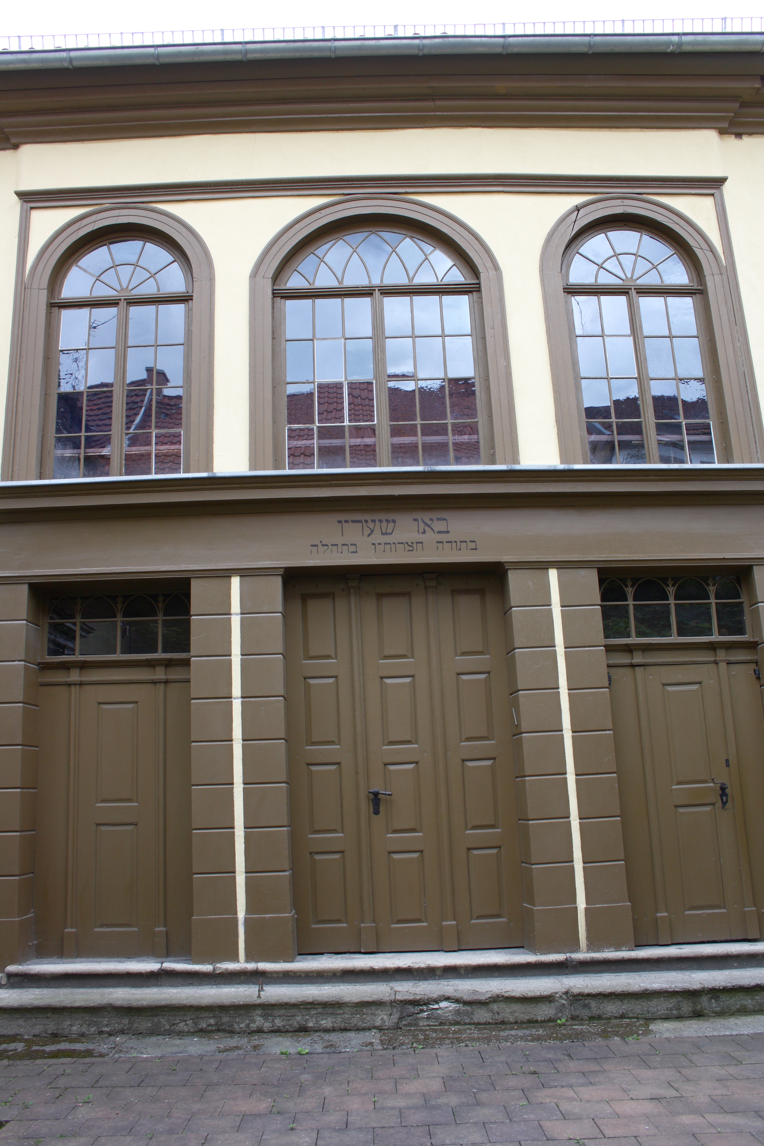 Synagoge in Mühlhausen in Thüringen